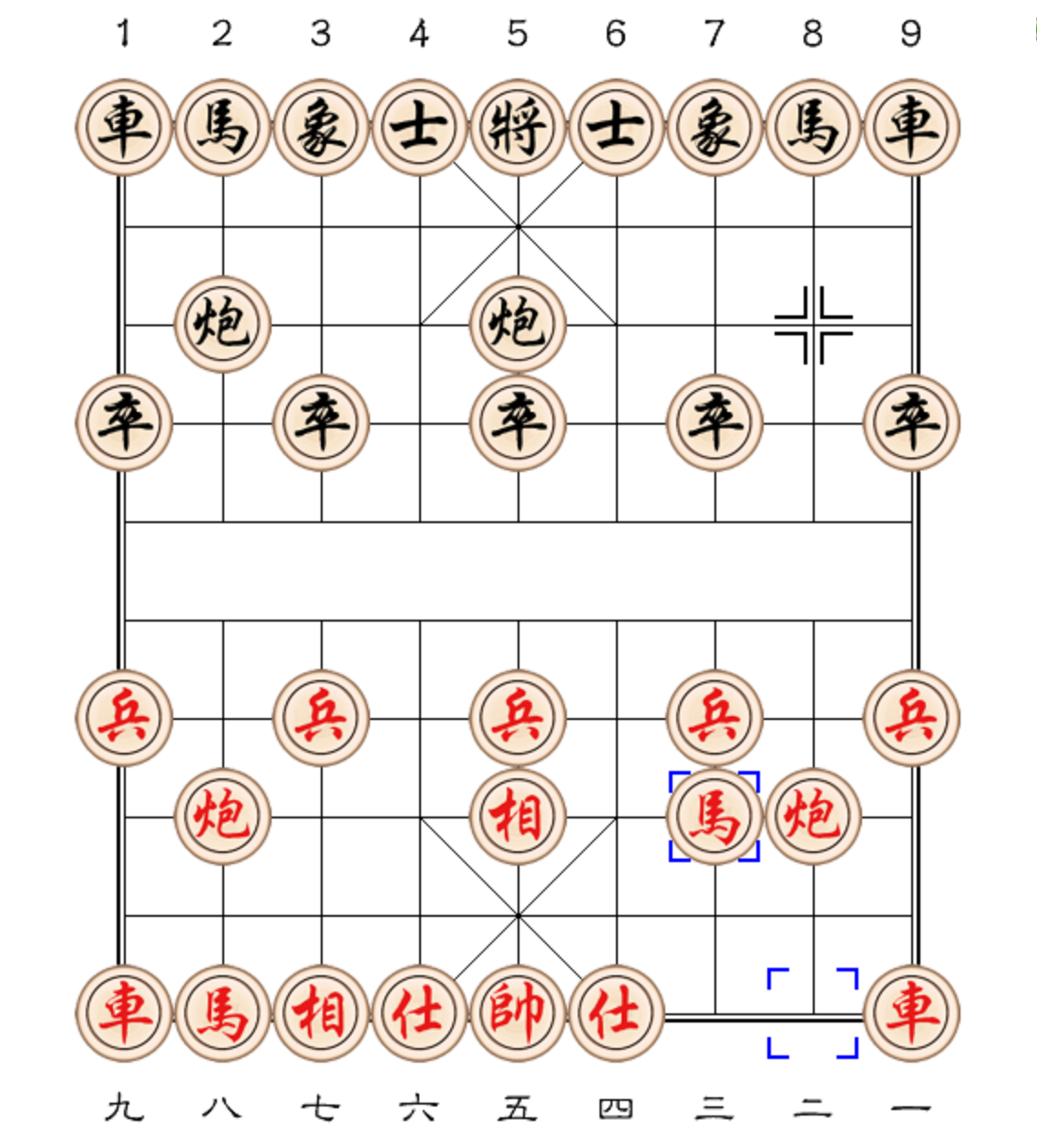 Phi tượng khởi chính mã